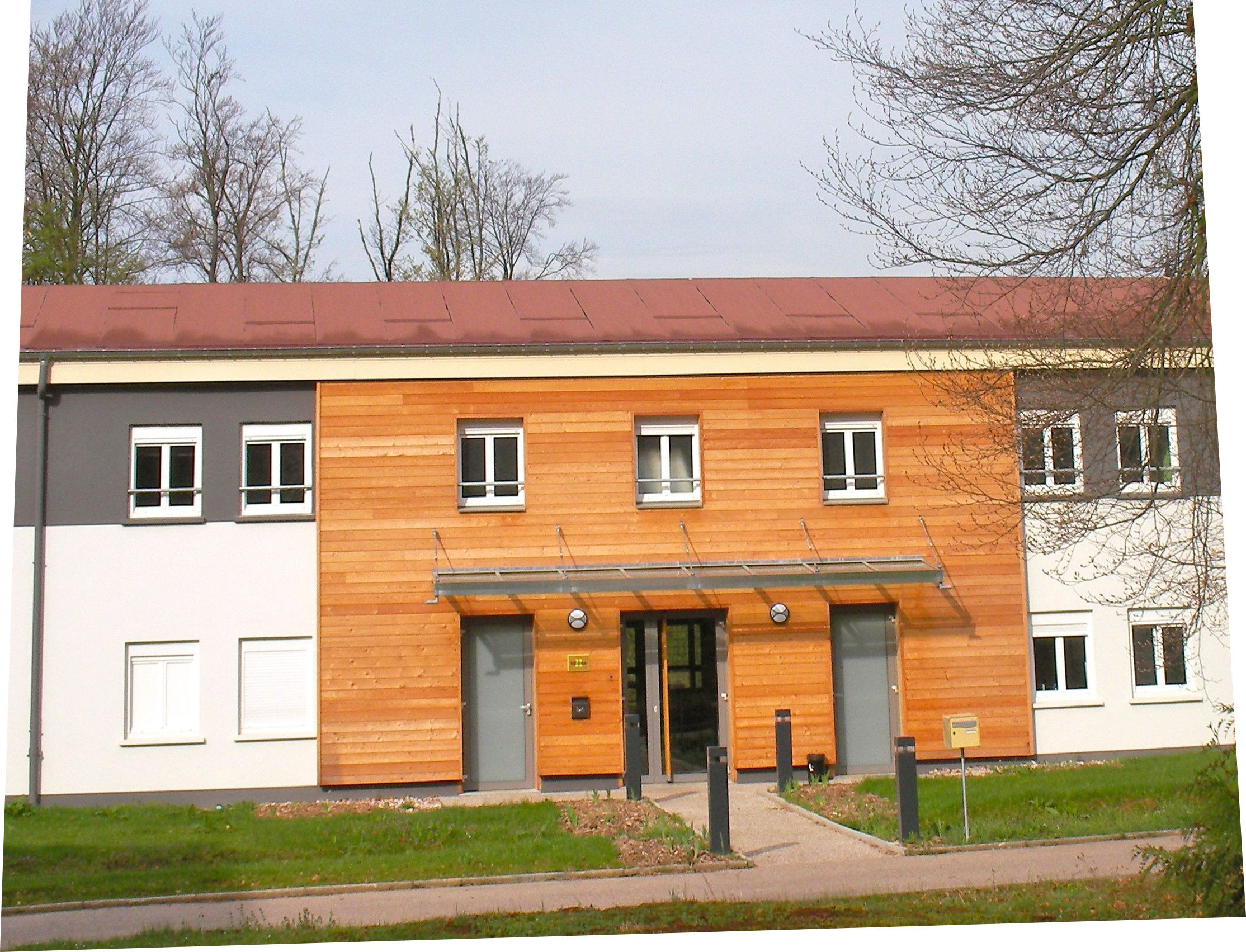 Bâtiment principal